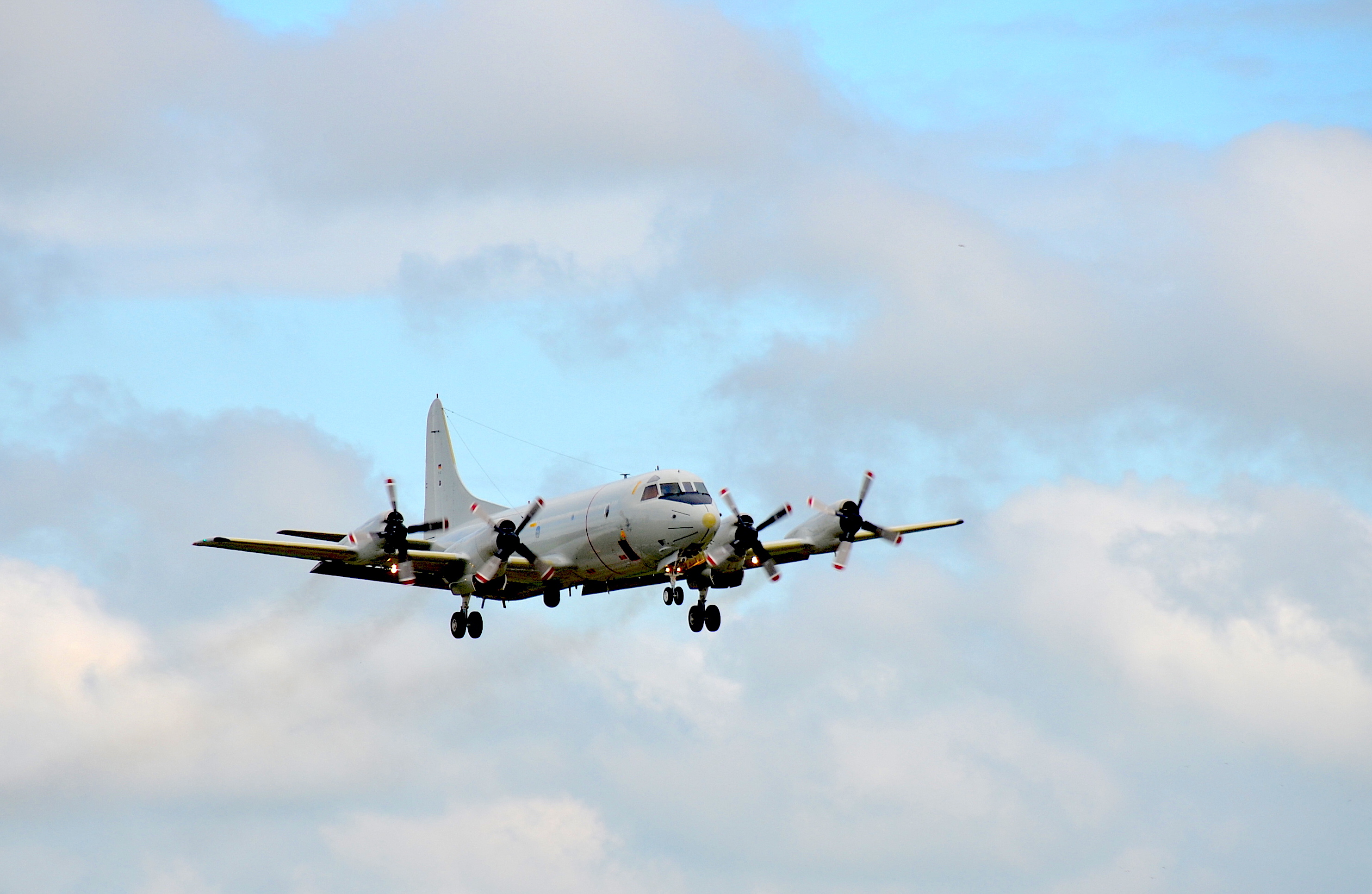 P-3C Orion im Landeanflug in Nordholz